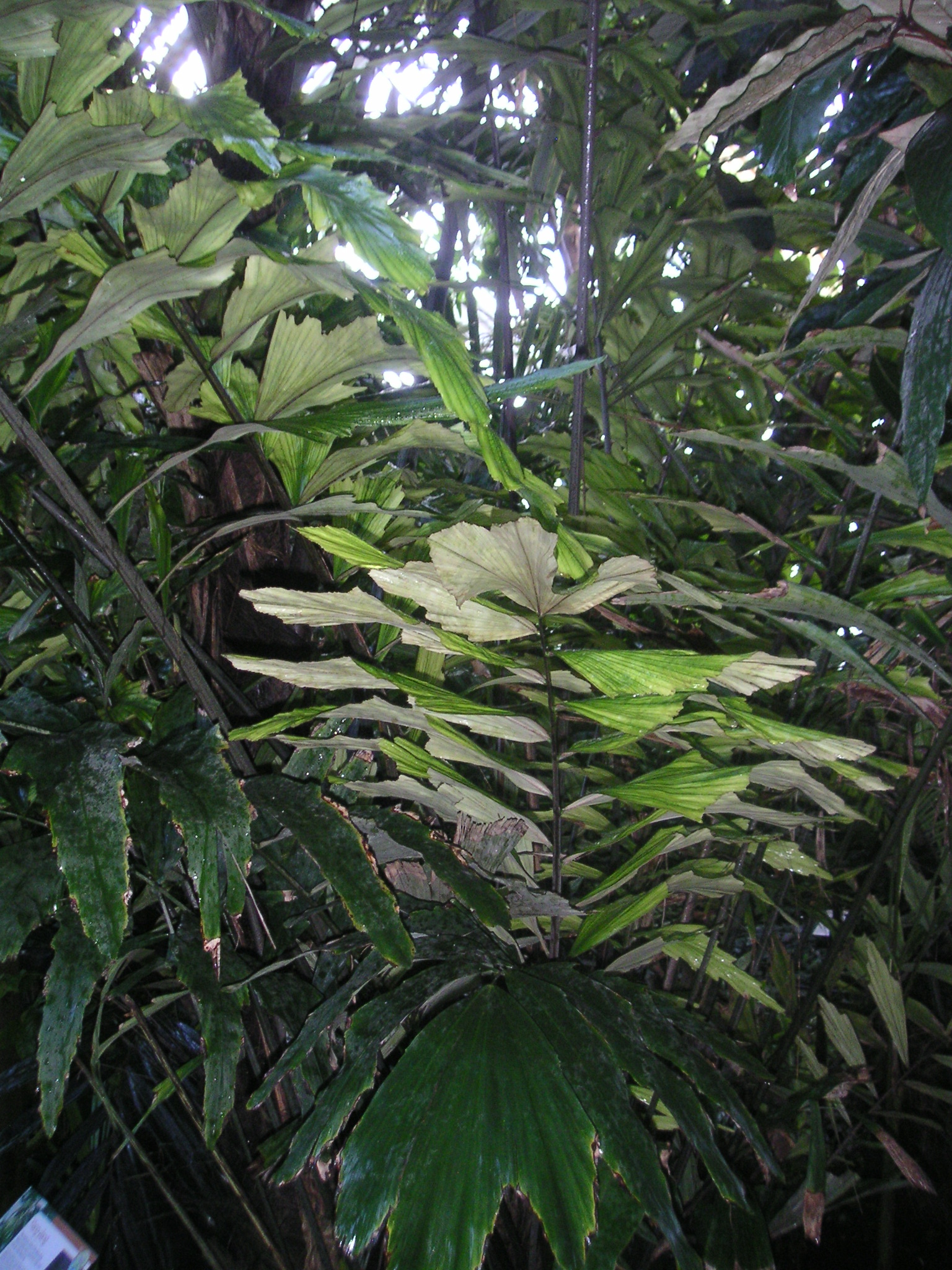 Arenga undulatifolia - syn: Arenga ambong, Leaves, at Kew Gardens, London, UK